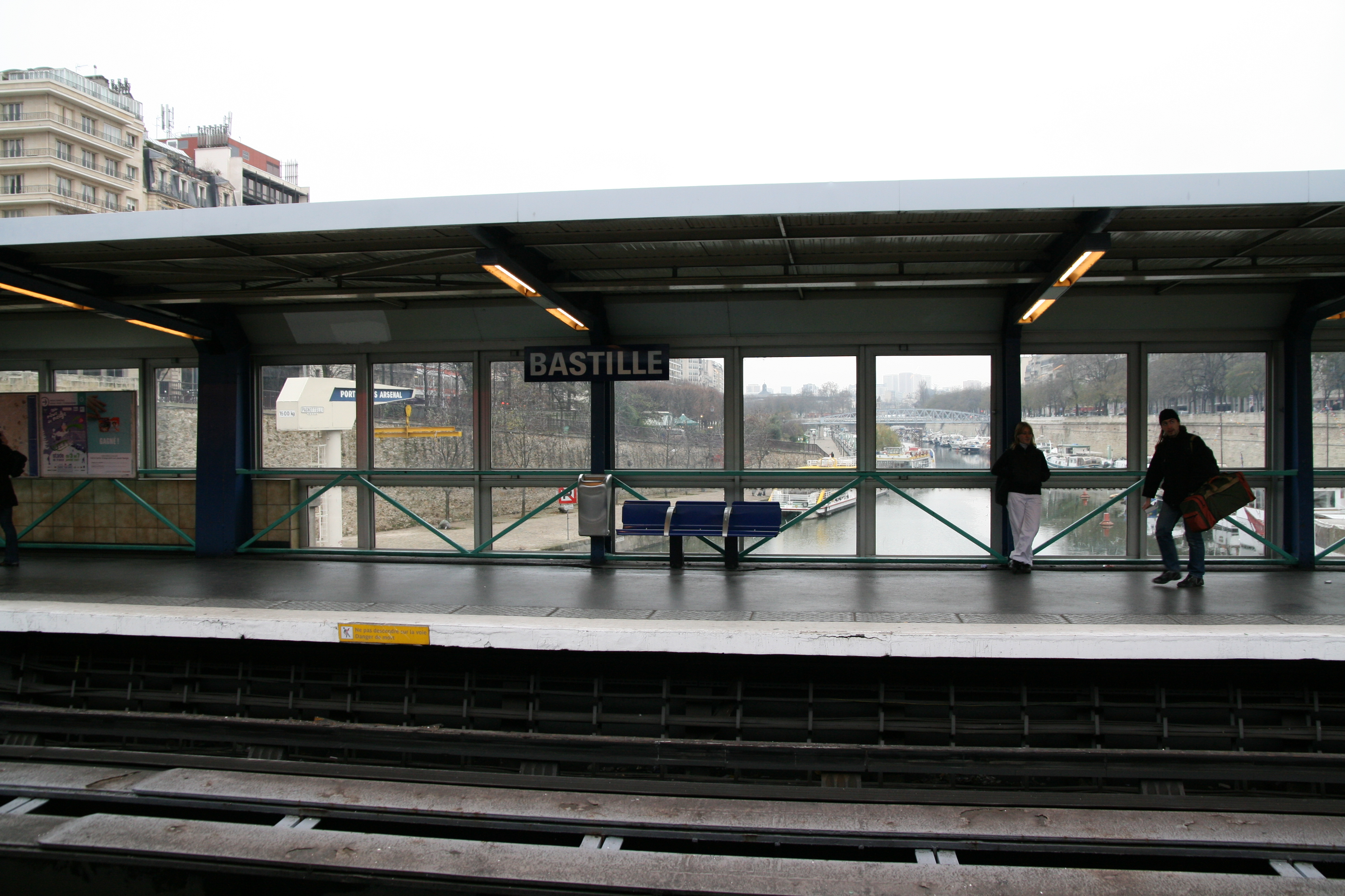 Bastille metro station